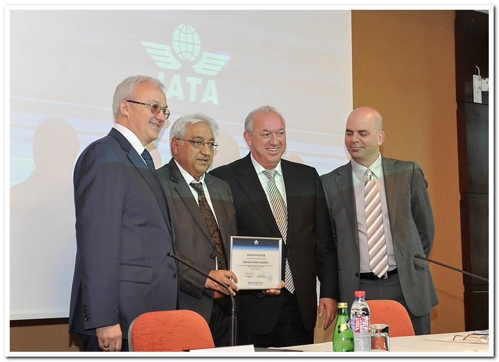 Milli Aviasiya Akademiyasına İATA sertifikatının təqdimatı zamanı